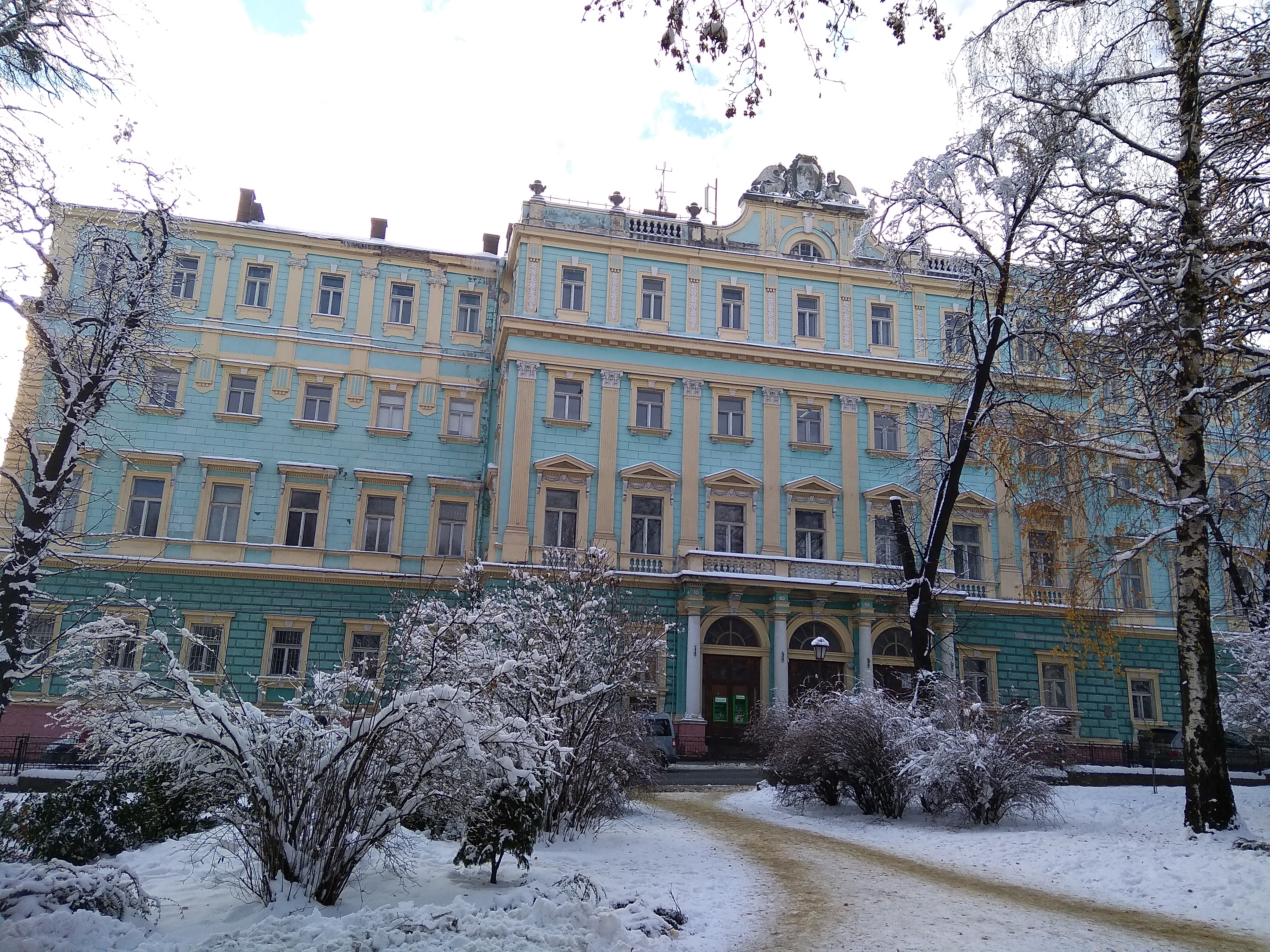 Будинок крайового уряду Буковини (арх. Глаубіц, Й. Главка) (мур.), Чернівці, Поповича Омеляна, 2 / Кафедральна, 2